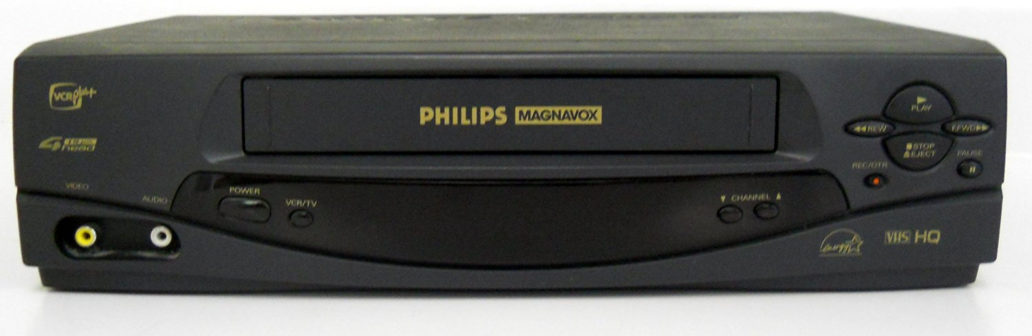 A typical model Phillips Magnavox VCR.